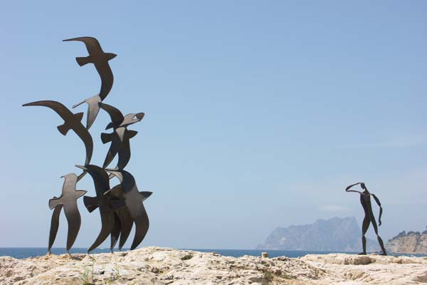 Escultura d'Antoni Marí